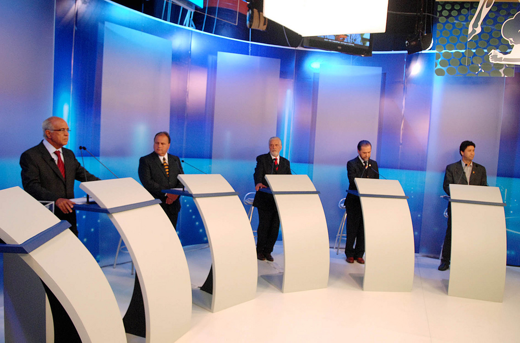 Paulo Souto participa de debate entre candidatos ao governo da Bahia na TV Bahia nesta terça-feira (28/09). Foto - Valter Pontes/Coperphoto